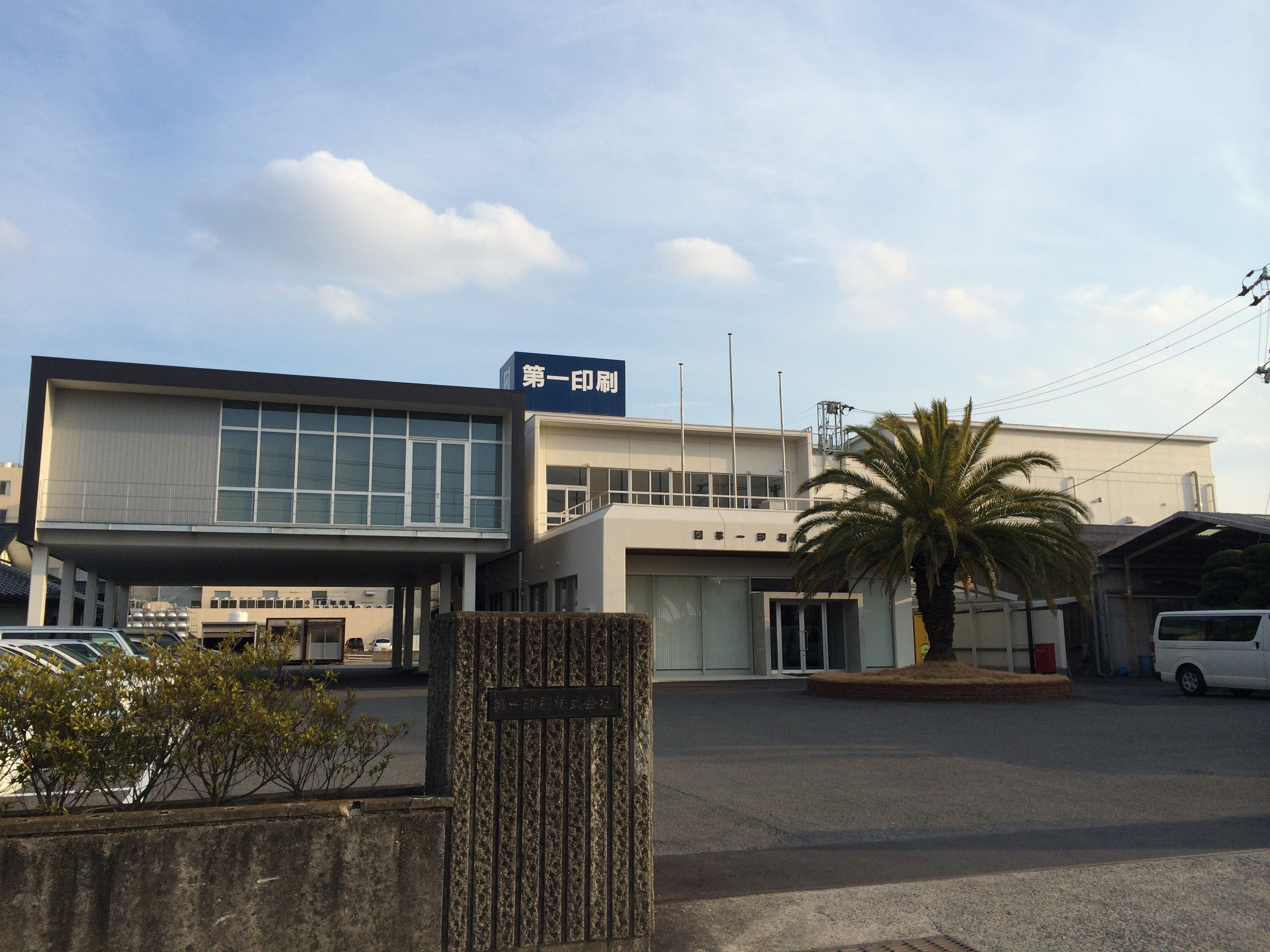 第一印刷本社ビル（愛媛県今治市）